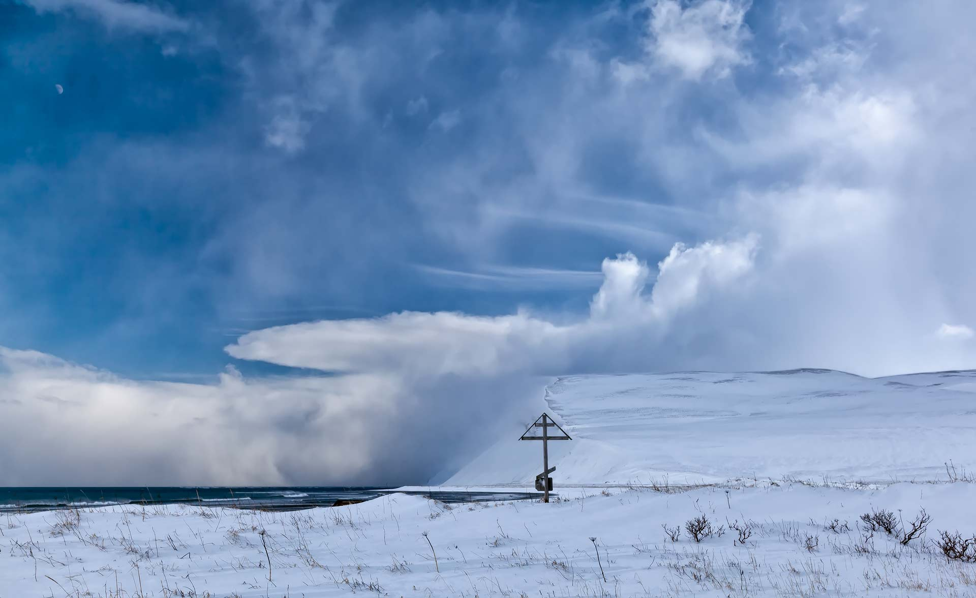 Бухта Командора: Алеутский район, Камчатский край, остров Беринга, Командорские острова. Место первоначального захоронения праха Витуса Беринга и пятерых членов его экипажа. This image is related to the protected area of Russia number 4110006